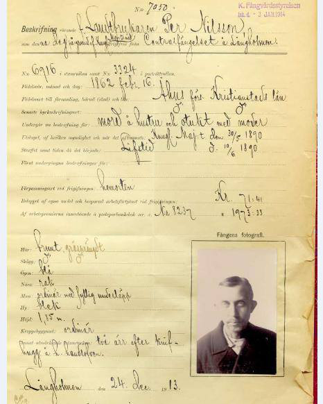 Per Nilssons fängelseprotokoll vid frigivning